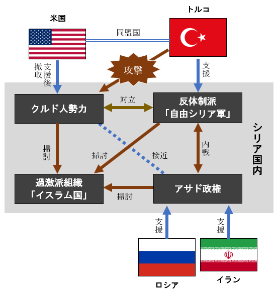 2019年10月時点でのシリア各勢力の相関関係